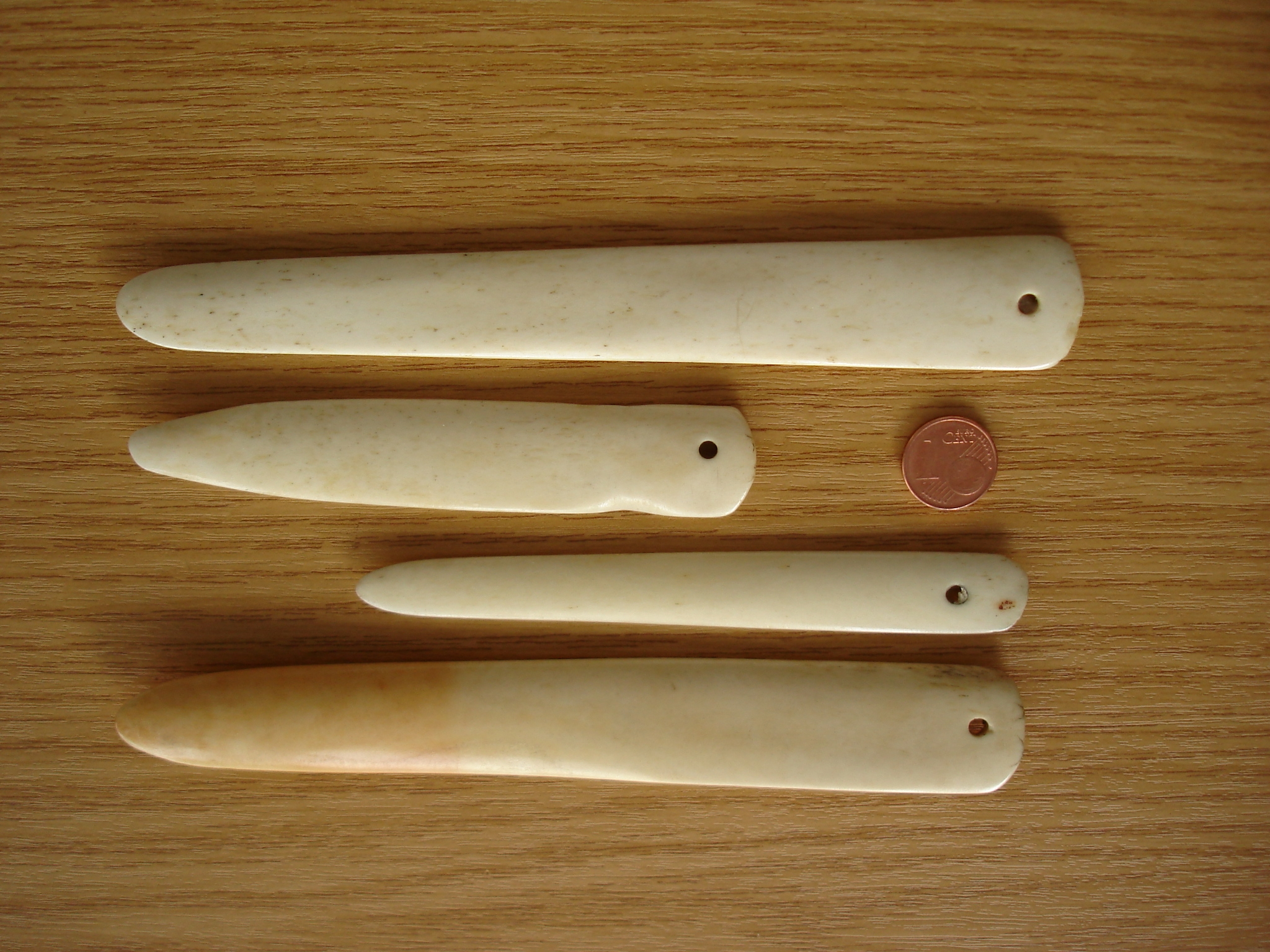 Falzbeine, ein Handwerksgerät der Buchbinder. Um 1950. Material unbekannt, möglich wäre Elfenbein oder Knochen, mit Sicherheit kein Kunststoff.